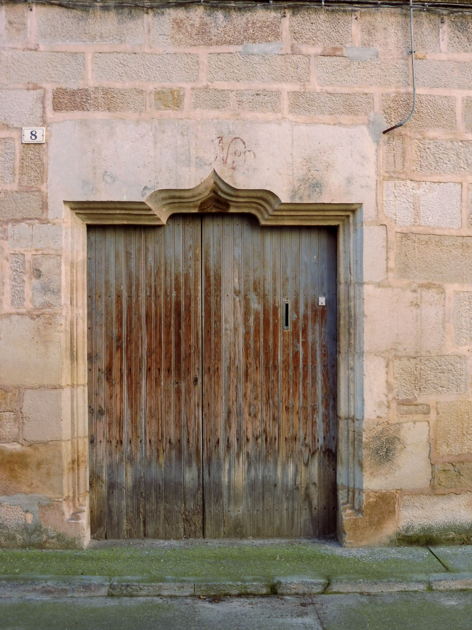 Ca l'Alzamora (Anglesola): portada